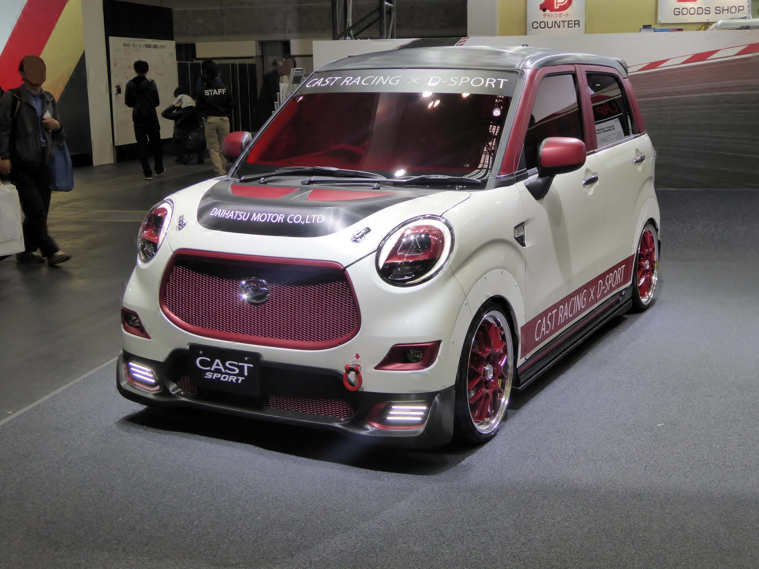 大阪オートメッセ2016においてダイハツ・キャストスポーツRACE Ver.を撮影。